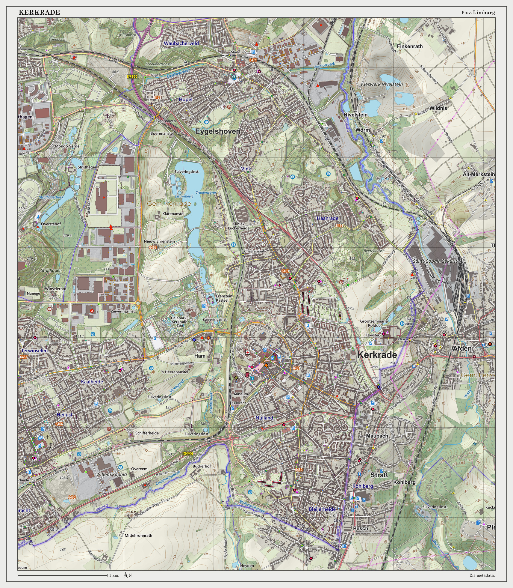 Topografische kaart van Kerkrade (woonplaats). Resolutie: 300 pixels/km. Kaartbeeld samengesteld uit de open geodata van de Top10NL en Top25namen (Basisregistratie Topografie, Kadaster), Creative Commons BY licentie. Gebouwvlakken uit open geodata BAG extract. Wegen uit de OpenStreetMap. Reliëfschaduw uit de Actuele Hoogtekaart AHN2. Samenstelling en kleurenschema: Jan-Willem van Aalst, met QGIS2. Zie ook de Legenda.